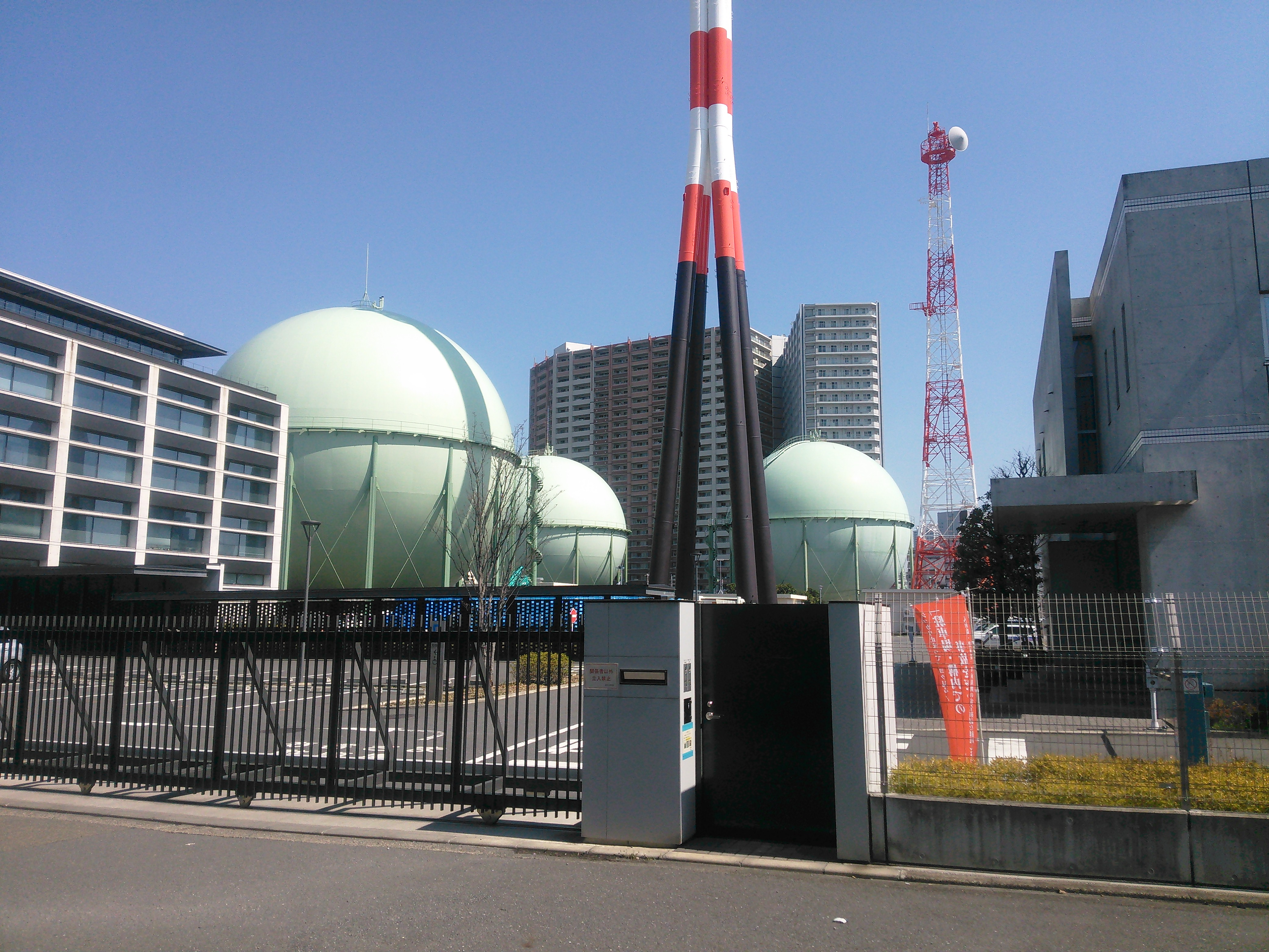 横浜市西区西平沼町、東京ガス平沼整圧所